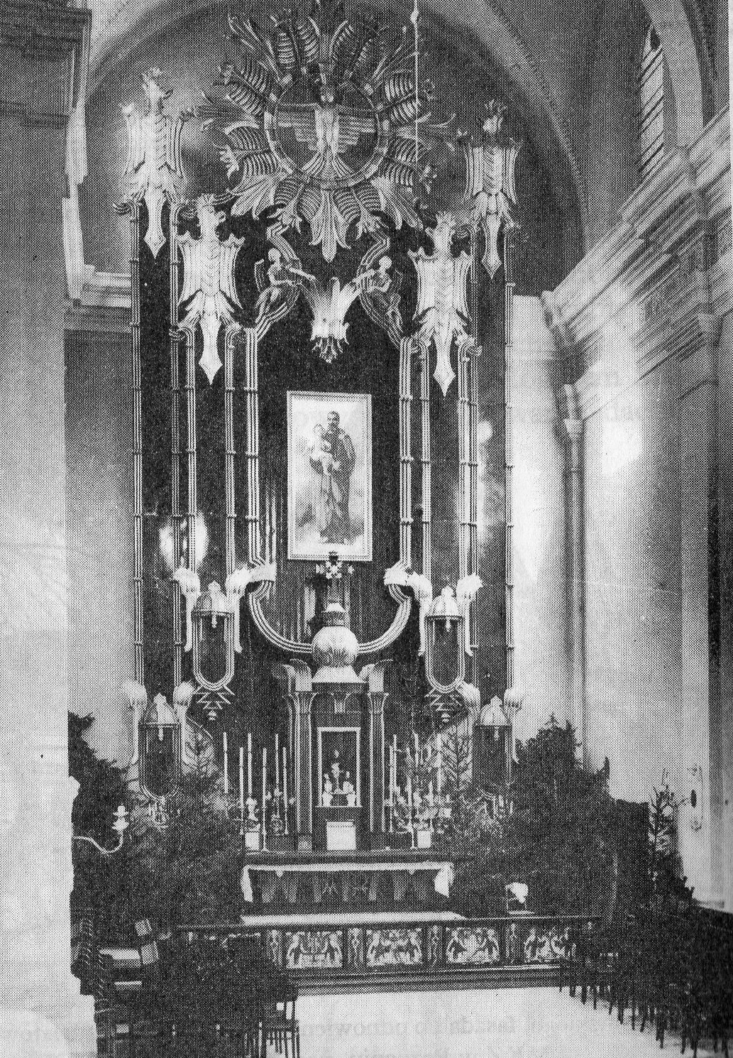 Ołtarz w kościele św. Józefa w Poznaniu z okresu m-wojennego (niezachowany). Około 1933r.